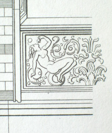 Brüstungsdetail des Feilnerschen Wohnhauses von Schinkel